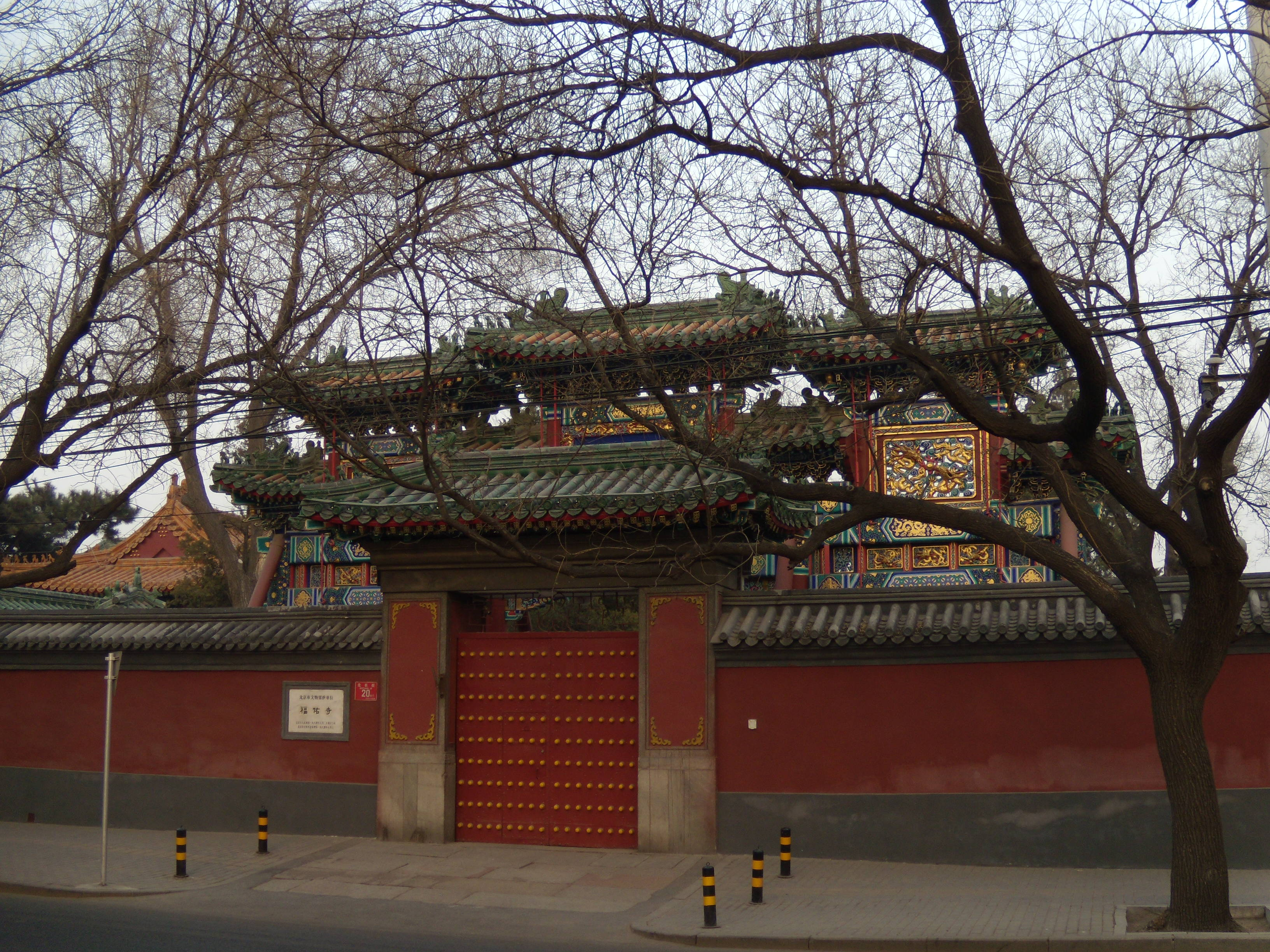 福佑寺